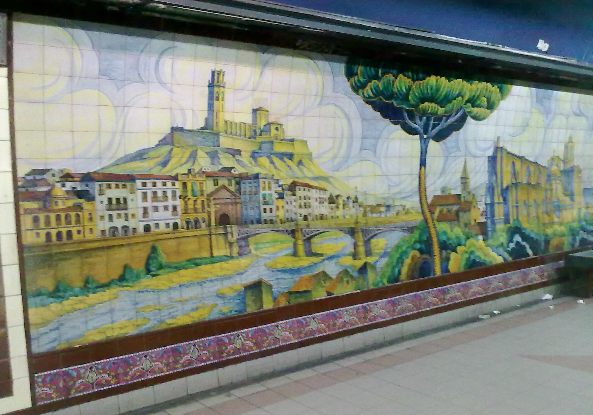 Parte del mosaico que representa los paisajes de España, (Lérida-Tarragona-Barcelona-Monserrat-Lérida, bocetos de Martín S Noel Manuel Esscasany. Realizado por hijos de Ramos Rejano, en Sevilla, España, en 1934, en la estación de subte Lavalle, lado oeste, de la línea C.